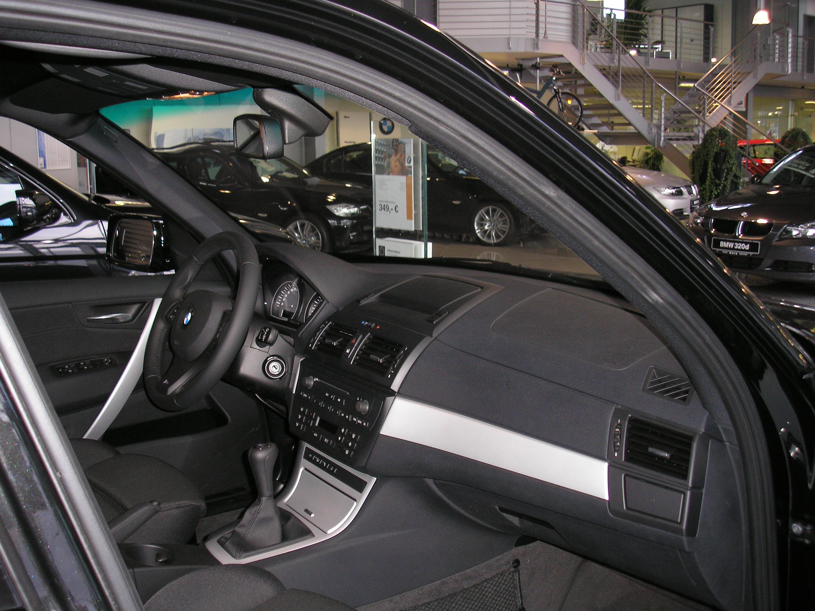 2007 BMW X3